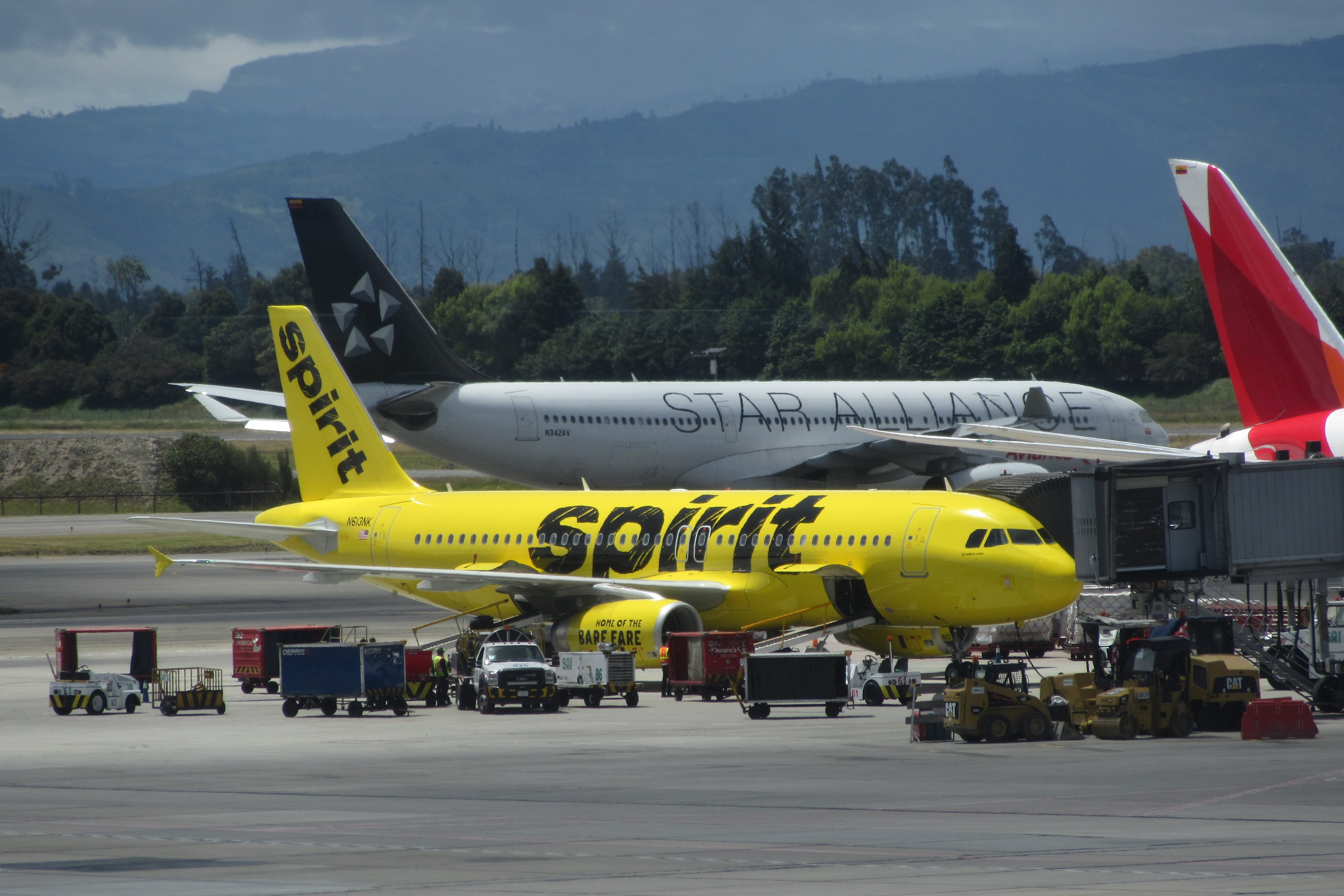 En primer plano (amarillo), Airbus A320-232 N613NK de Spirit Airlines. En segundo plano, Airbus A330-200 N342AV de Avianca.